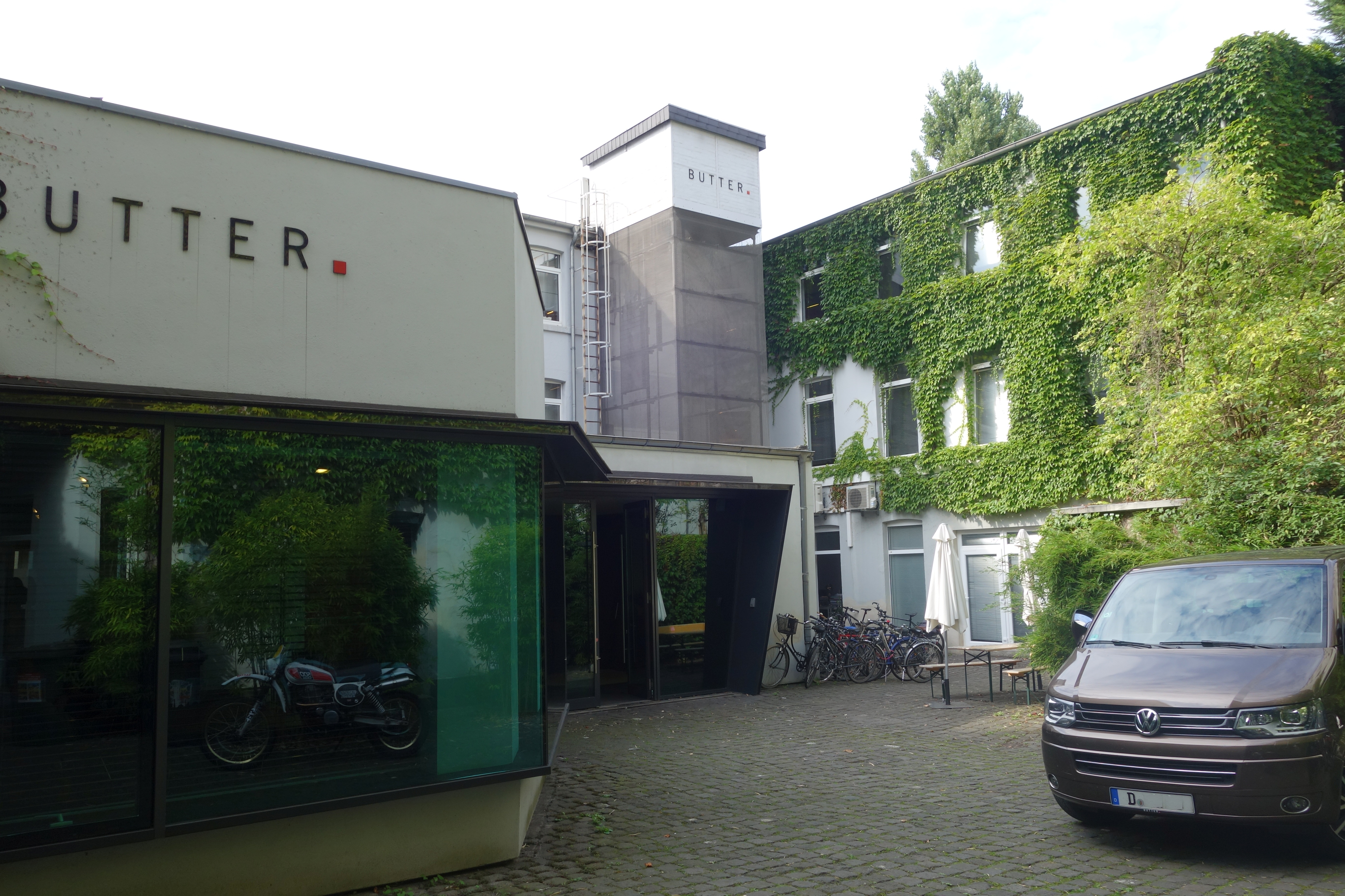 Düsseldorf, Kronprinzenstraße 87, Hof, Werbeagentur Butter (2017).